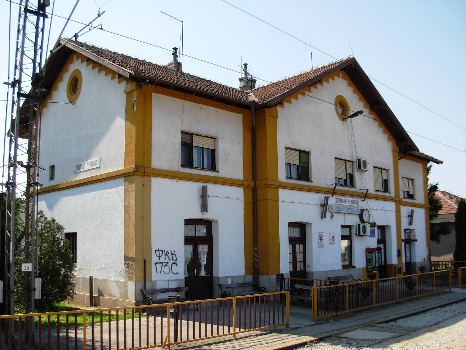 Železnička stanica u Petrovaradinu.